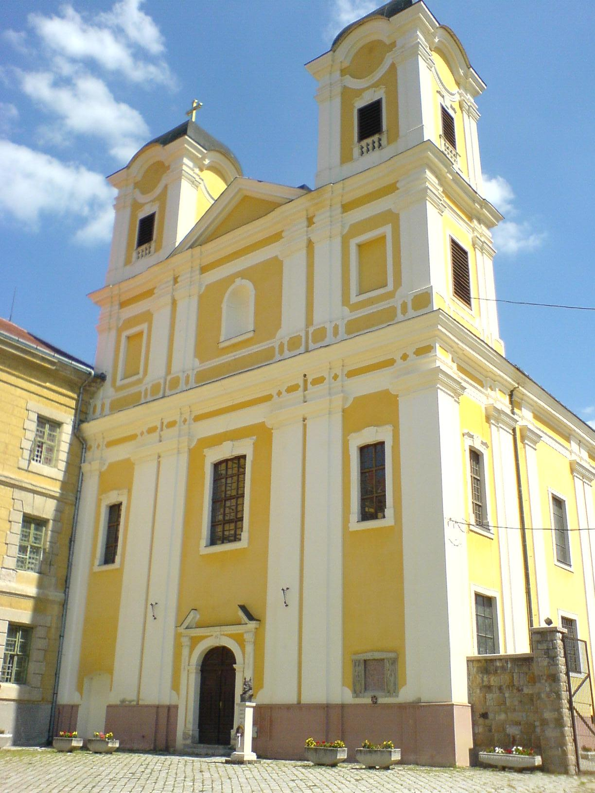 A Magyarok Nagyasszonya Plébániatemplom Márianosztrán (búcsújáró kegyhely). Épült 1719 és 1738 között